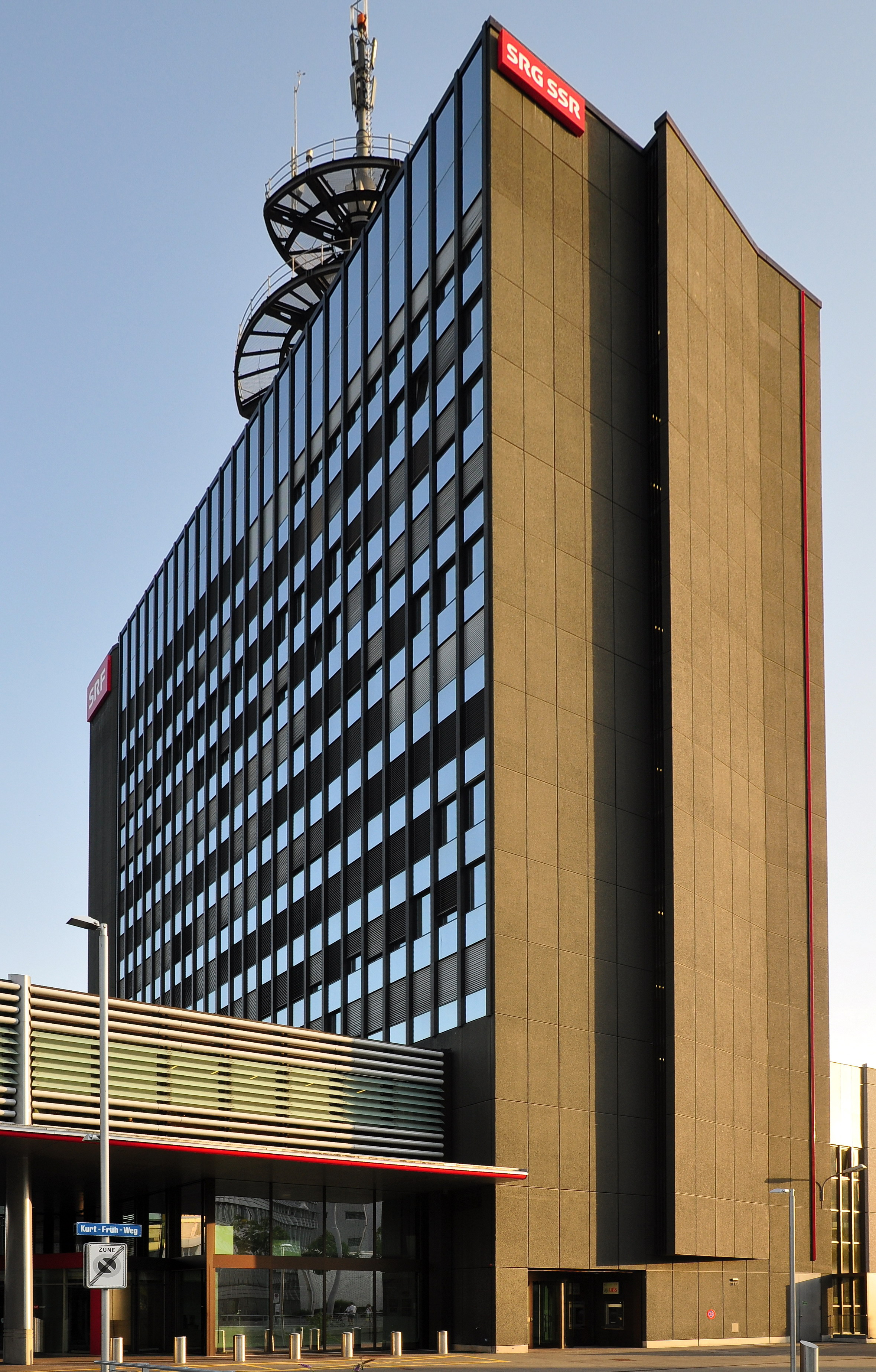 Schweizer Fernsehen DRS, Leutschenbach in Zürich-Seebach (Switzerland)